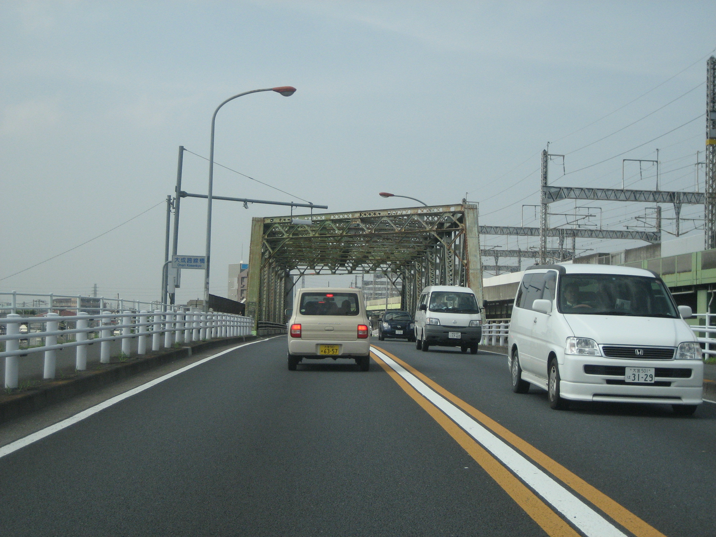 国道１７号線大成橋